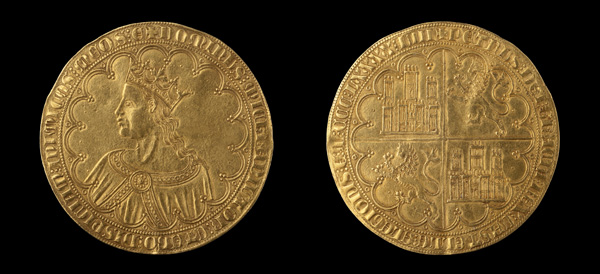 Gran Dobla de Pedro I (Reinos hispanocristianos). Número de inventario: 1867-21-2.